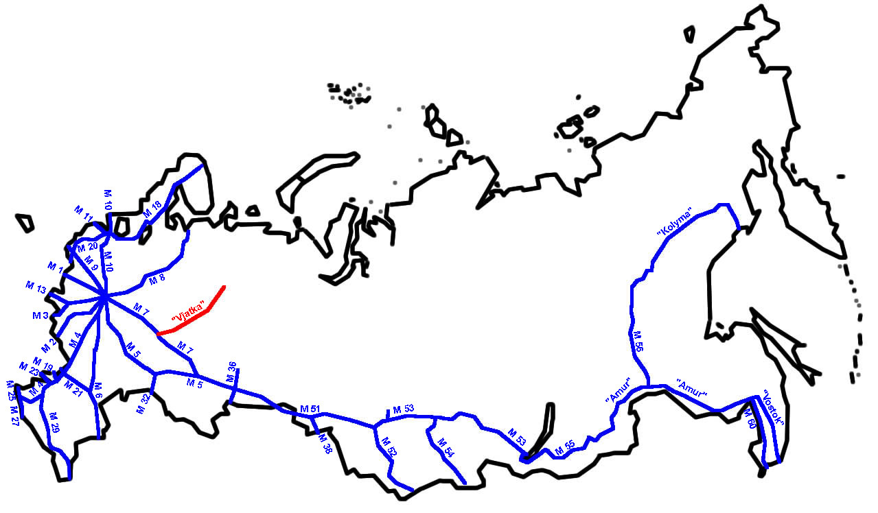 "Vjatka" im russischen Fernstraßennetz